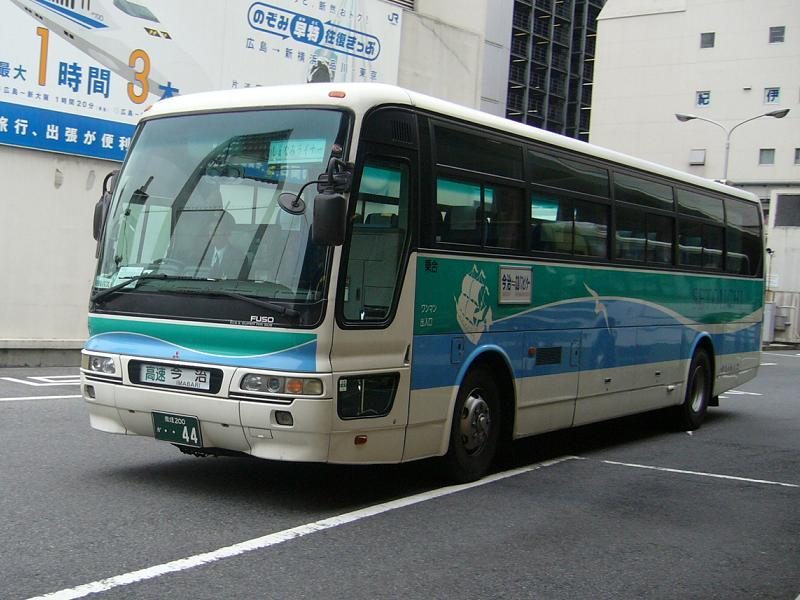 登録番号 愛媛200か・・44 せとうちバス所属 しまなみライナー号用 2007年2月26日 広島バスセンターにて撮影 撮影者 Tokatsu kokubu